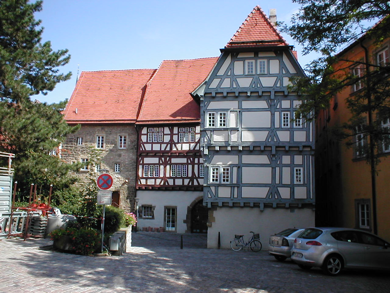 Spital in Bad Wimpfen, heute Stadtmuseum